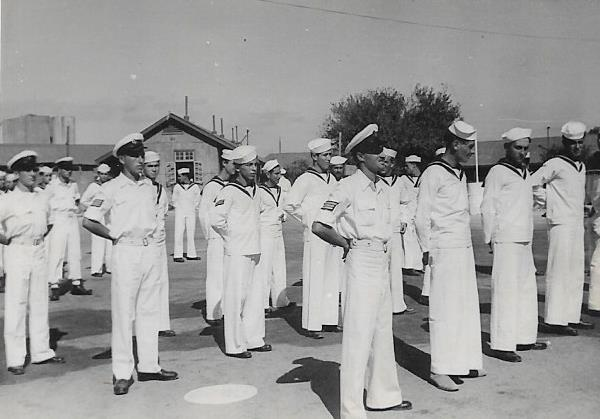 חיל הים במדים לבנים השתלמות מקצועית לצוותי הקורבטות בבסיס ההדרכה